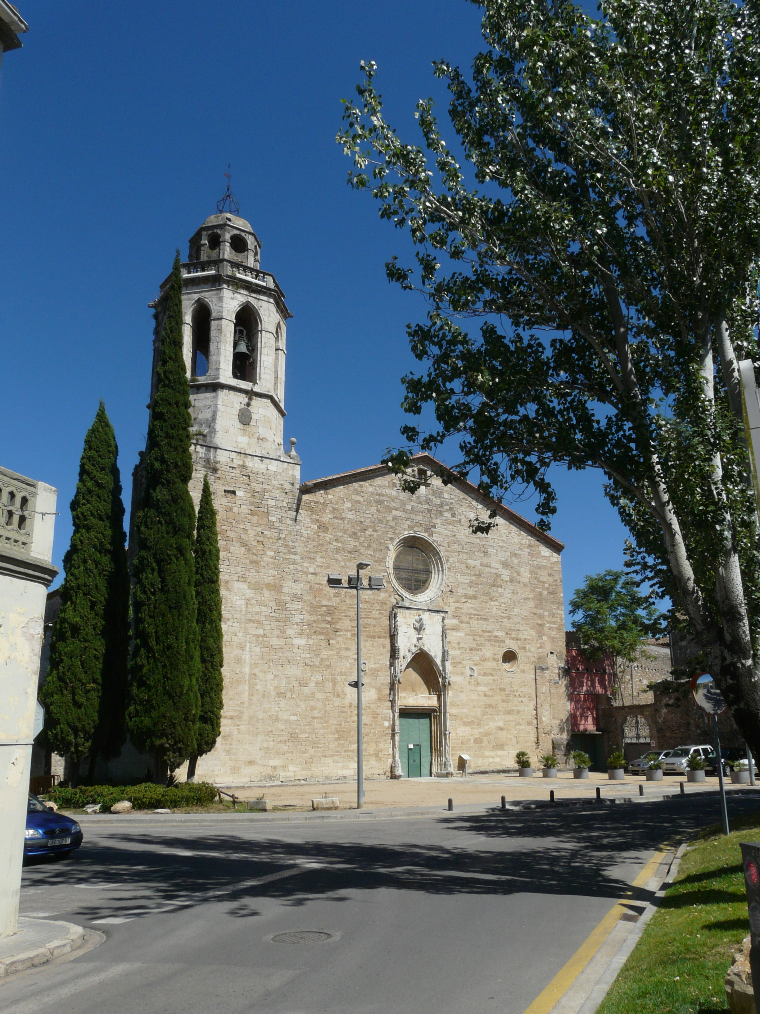 Monestir de Sant Esteve. Pl. del Monestir (Banyoles). Object location42° 07′ 14″ N, 2° 46′ 10″ E